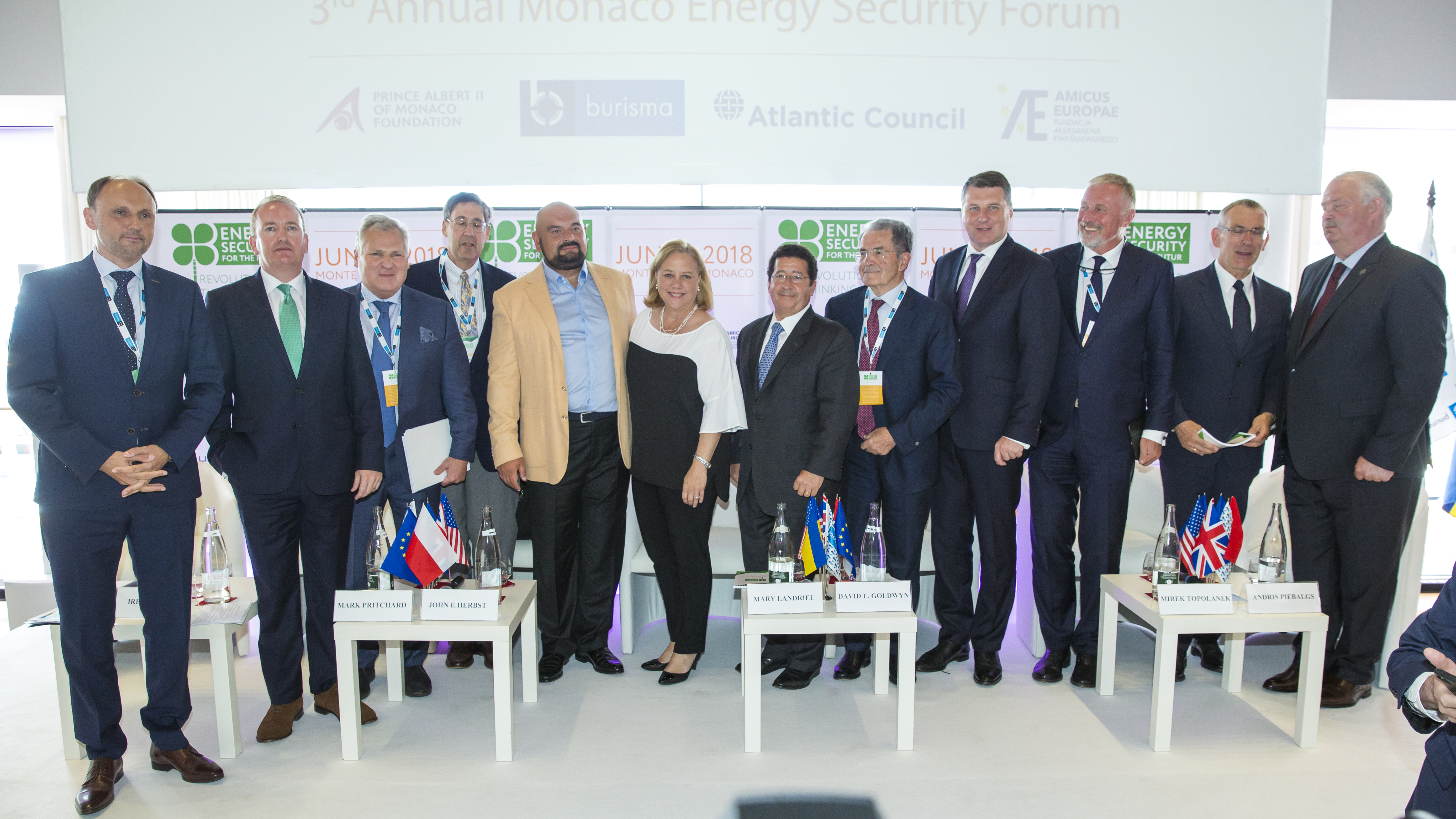 Спікери та гості Міжнародного форуму з енергетичної безпеки в Монако, 2018